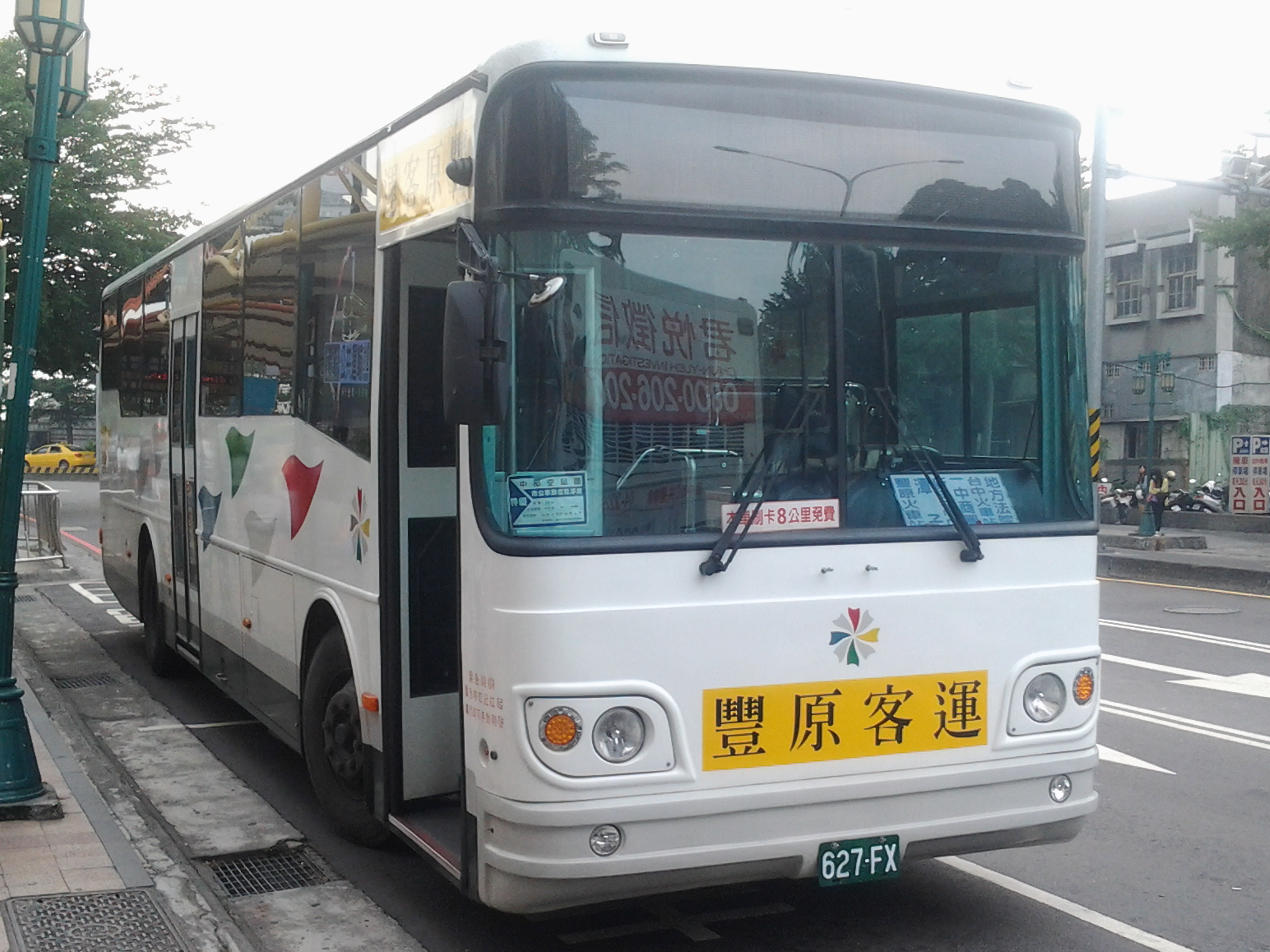 豐原客運日野RK8JRSK大客車627-FX。